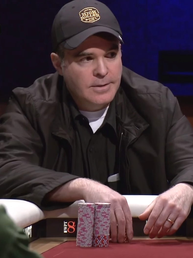 Cary Katz beim WPT Alpha8 in Las Vegas